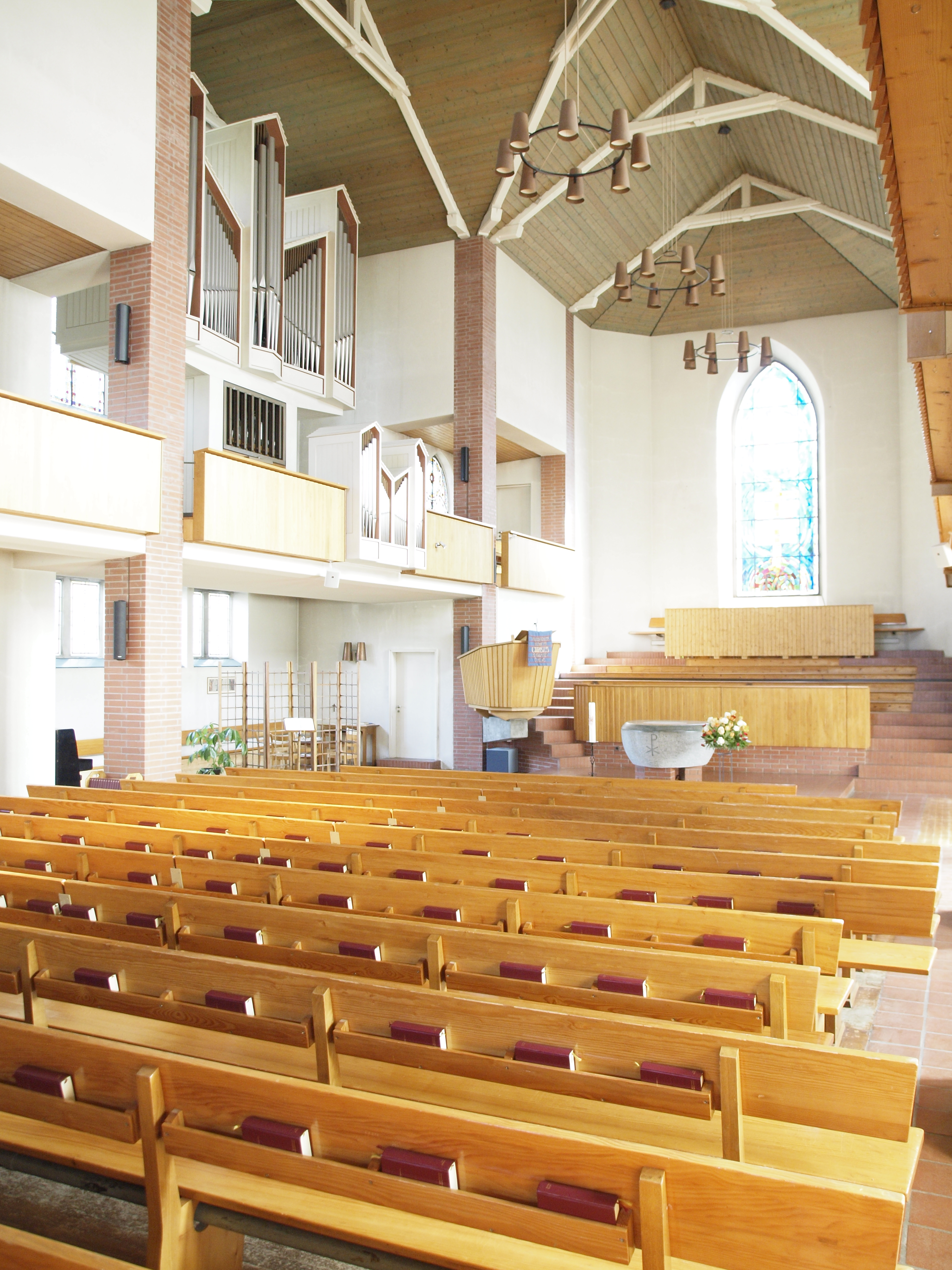 Innenraum der reformierten Kirche Adliswil.